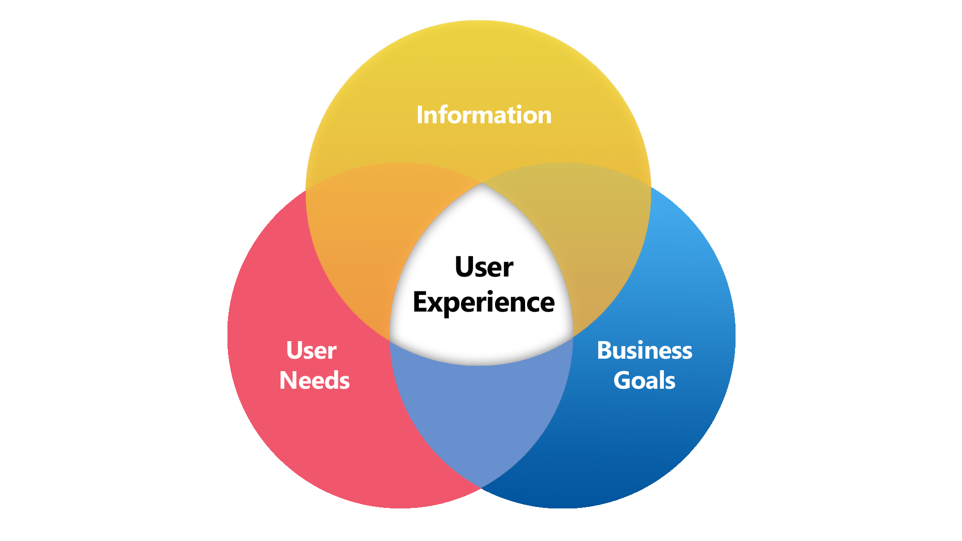 UX diagram